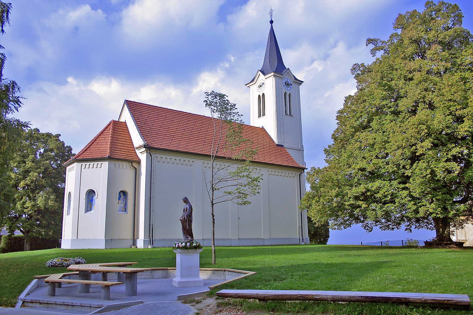 Die Kirche von heilige Benedikt, Kančevci.